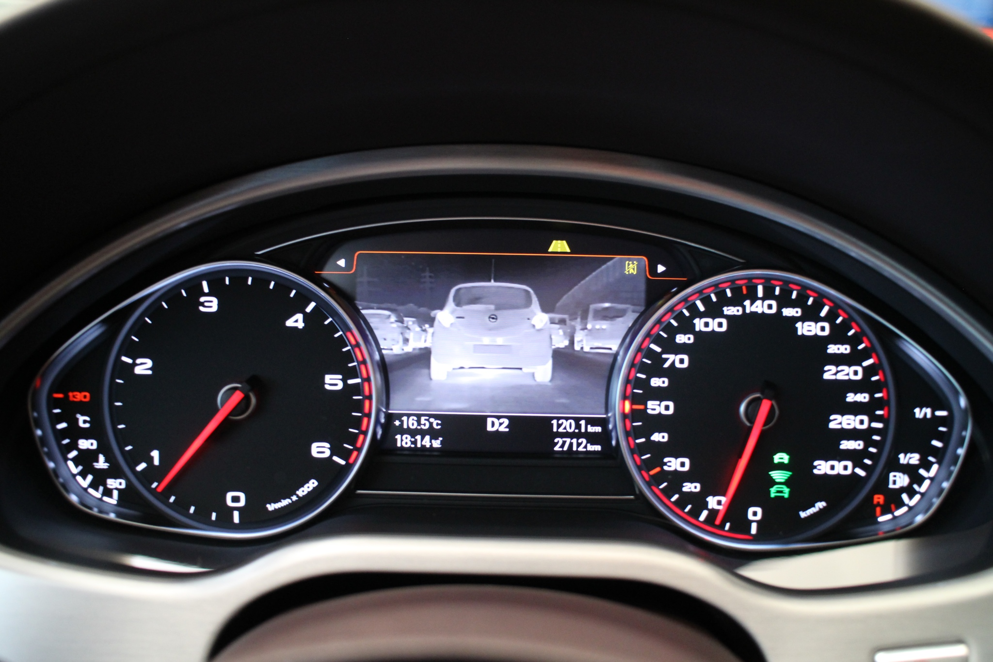 Facelift